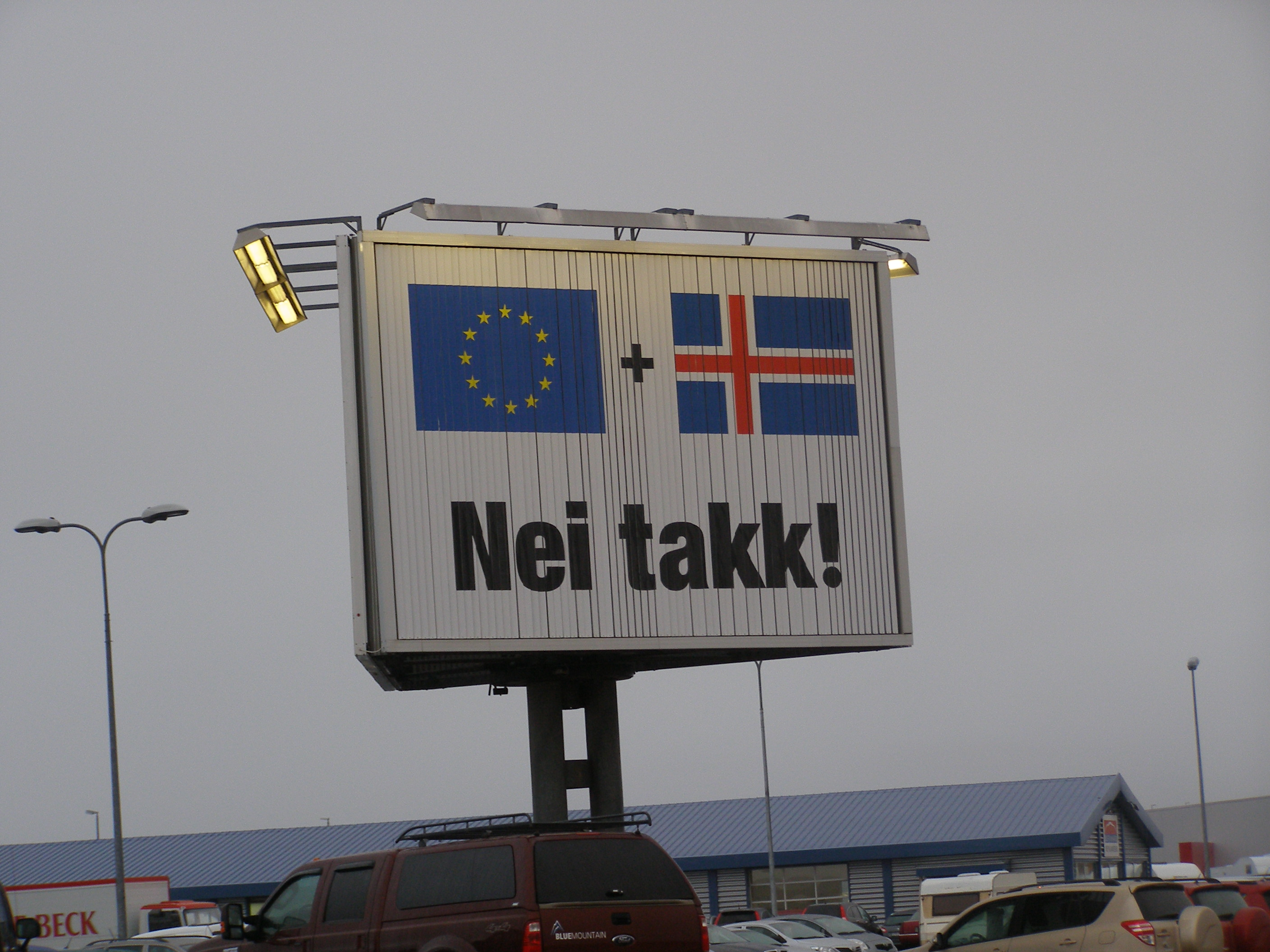 "EU + Island. Nein Danke!" Werbeplakat in Keflavík.